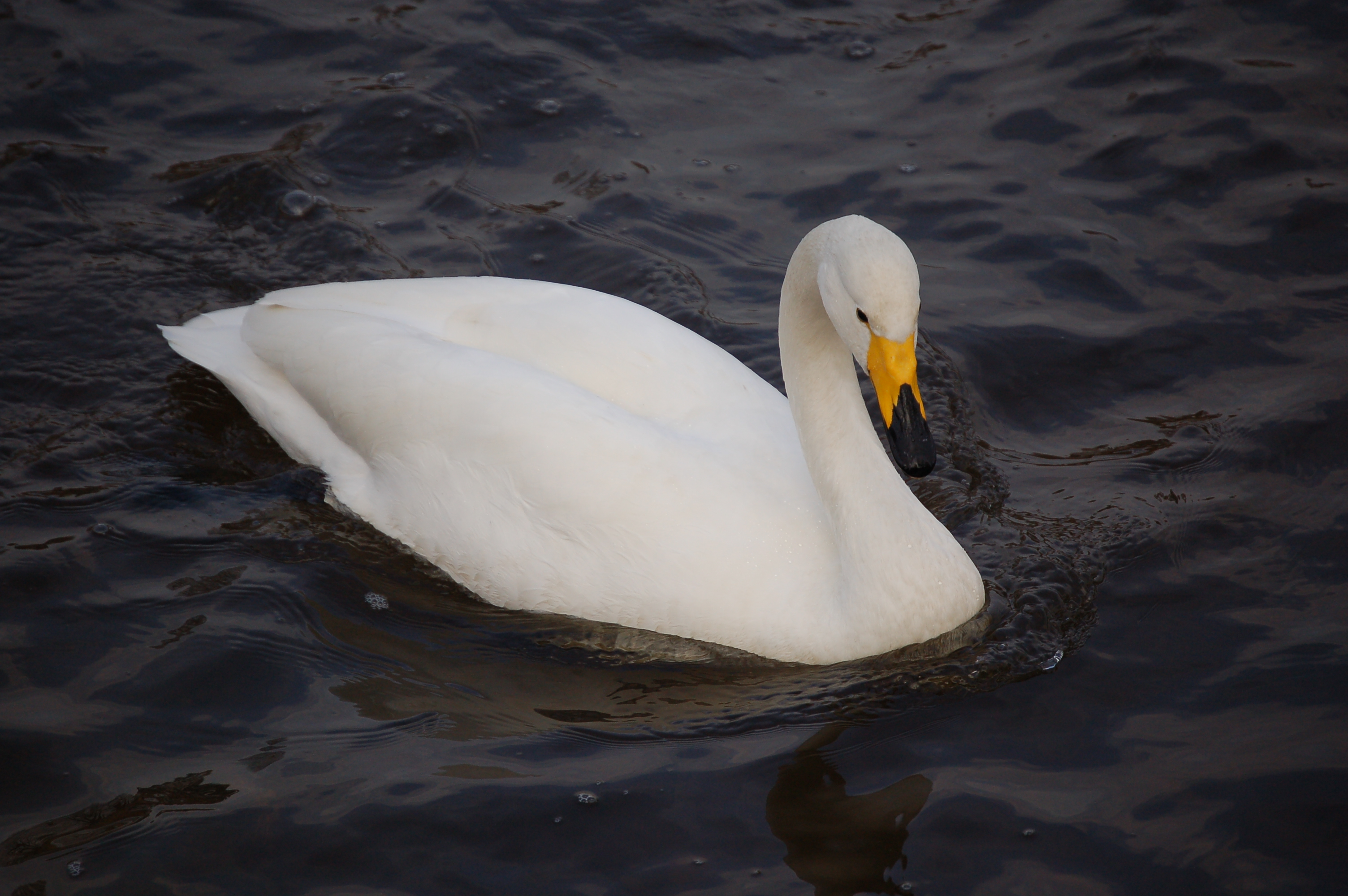 Singschwan (Cygnus cygnus)